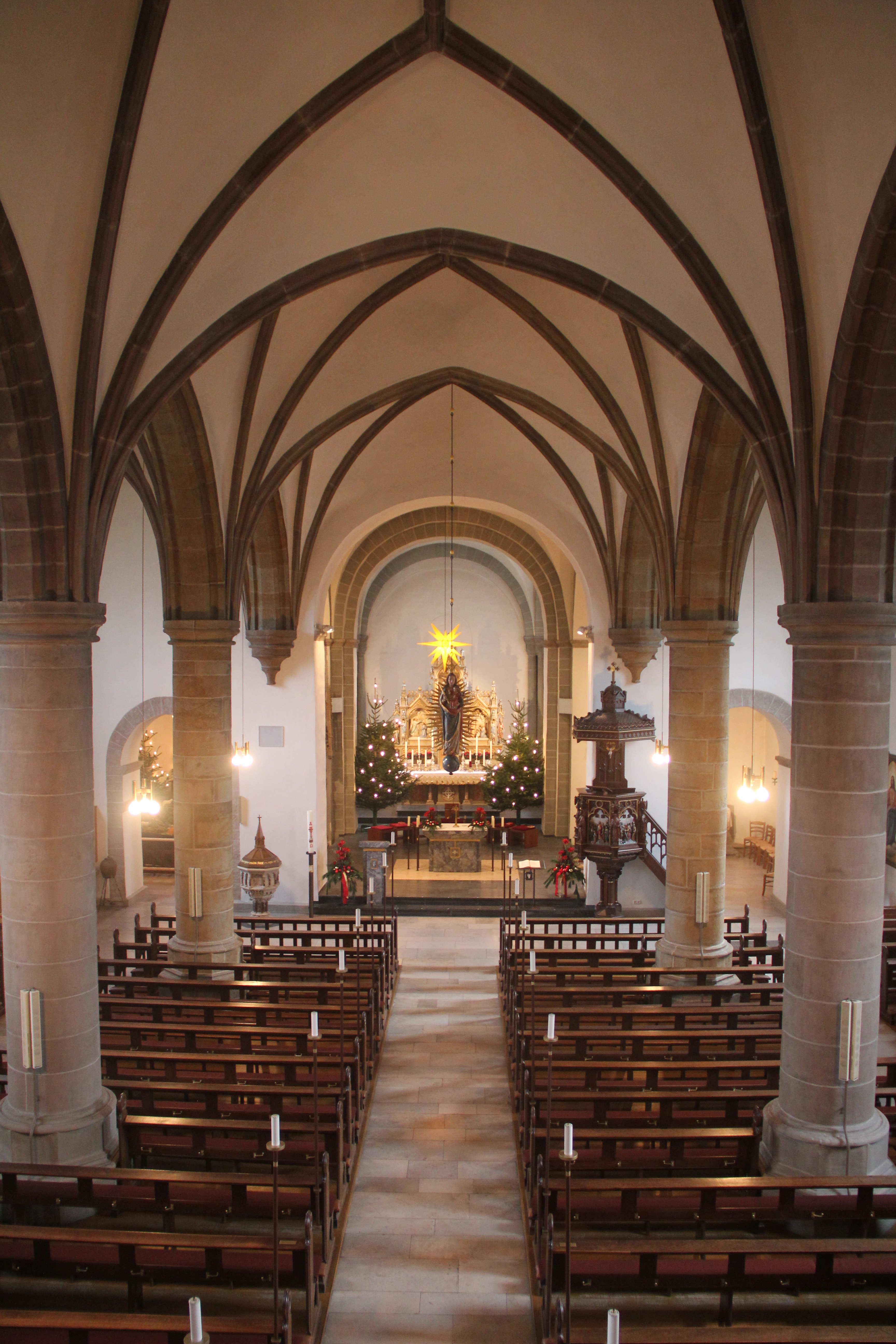 Innenraum der St. Pankratiuskirche in Störmede